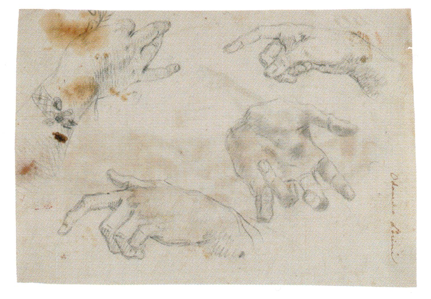 Kabinet grafike Hrvatske akademije znanosti i umjetnosti